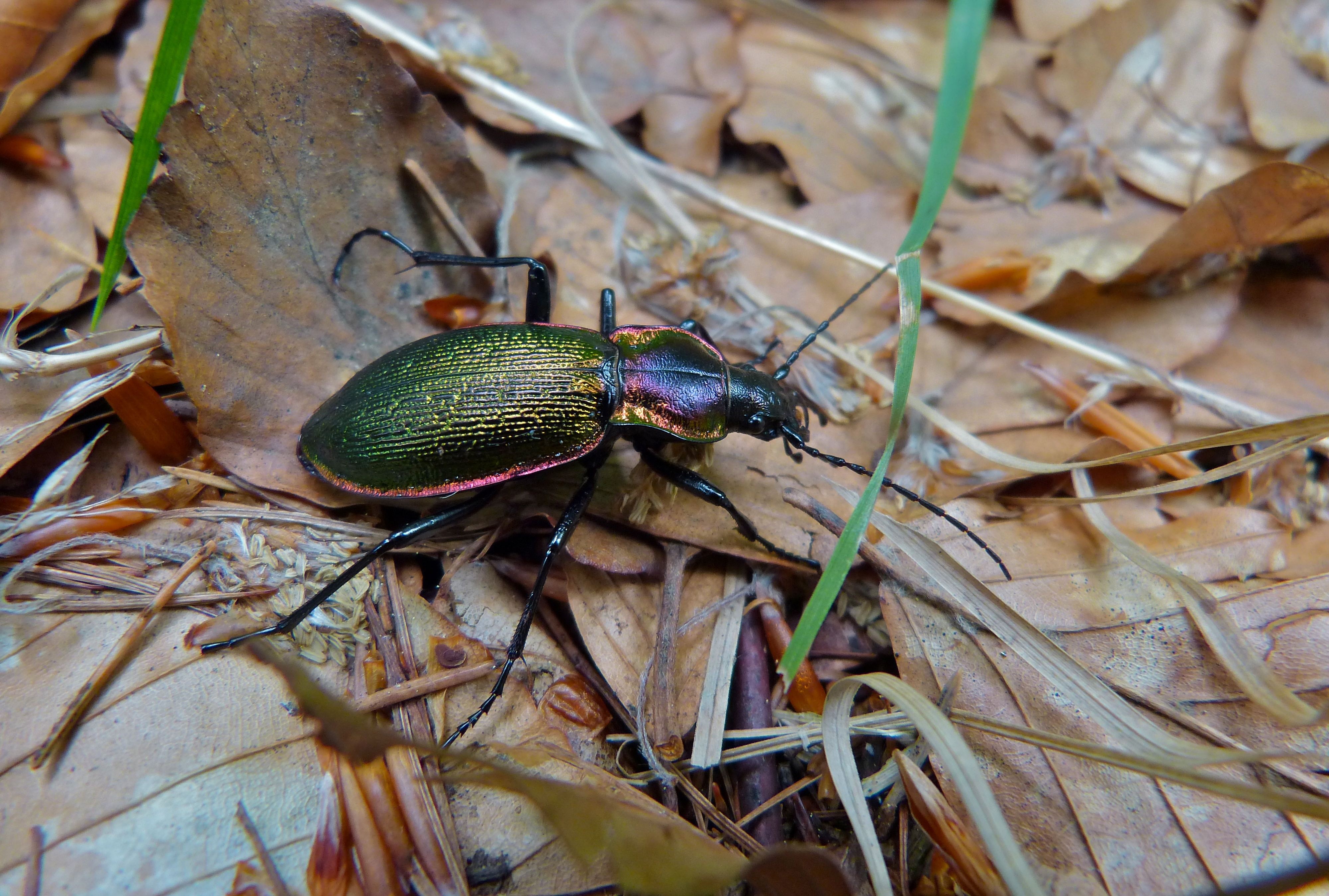 Bocchetto Sessera, Bielmonte, Biella, Piedmont, ITALY